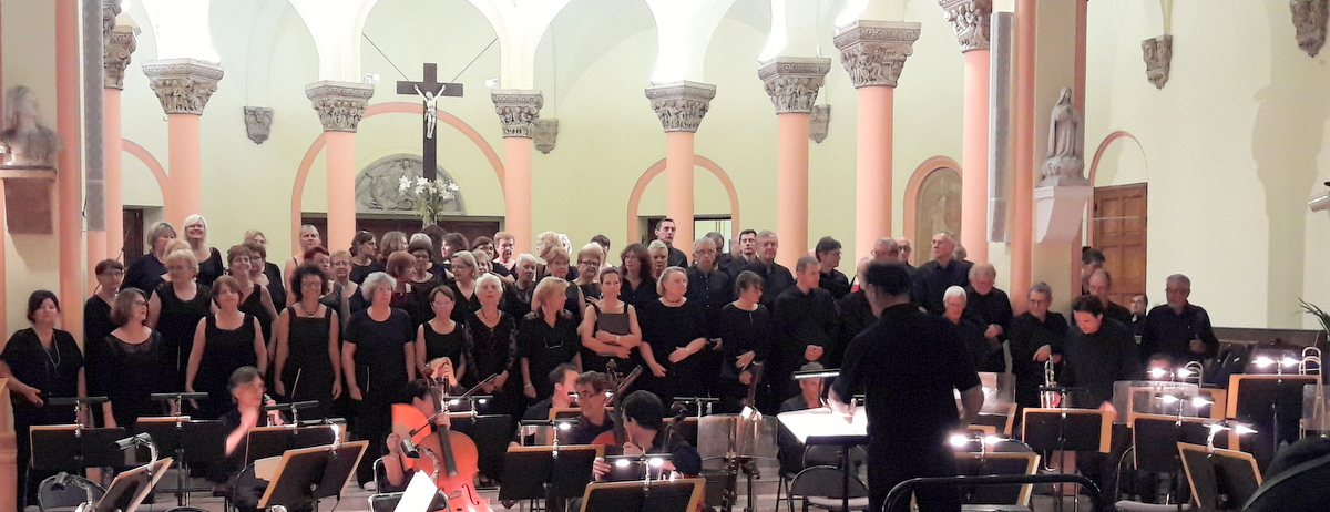 Concert Andantino du 16 juin 2017 Requiem de Mozart